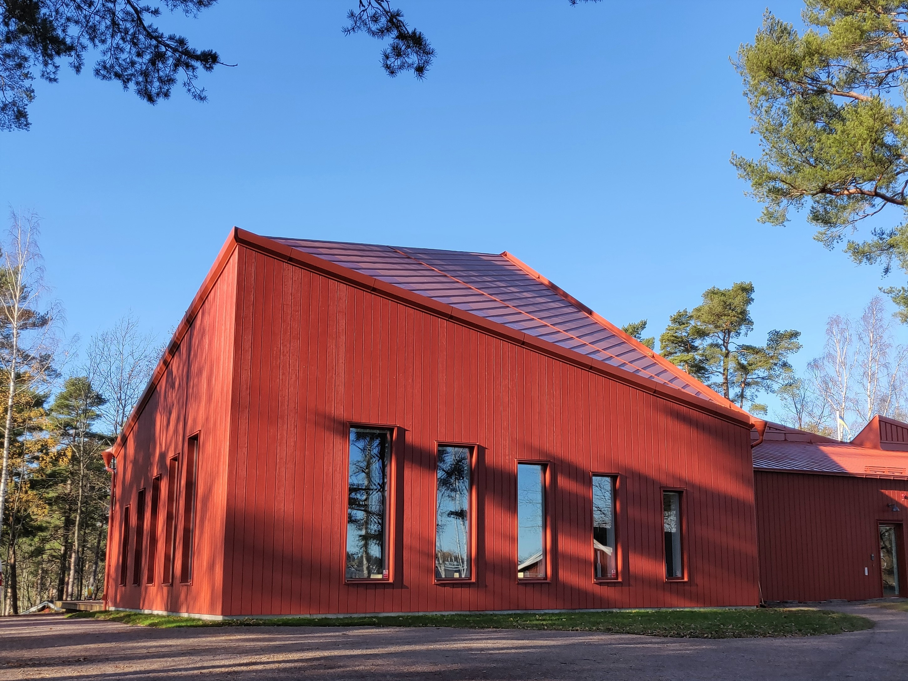 Furulid kyrka, arkitekt Per Dockson